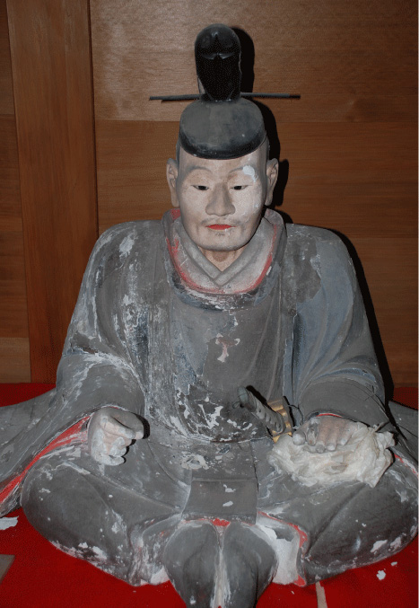 島津元久木像